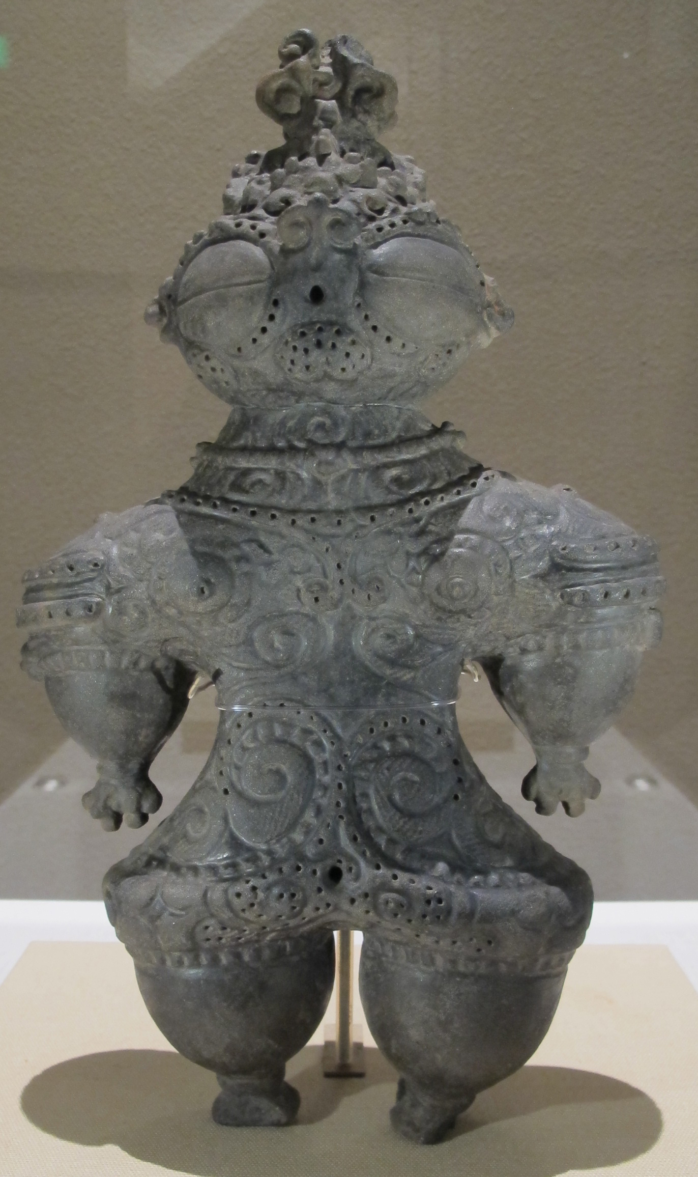 Periodo jomon finale, dogu, 1000-400 a.c.